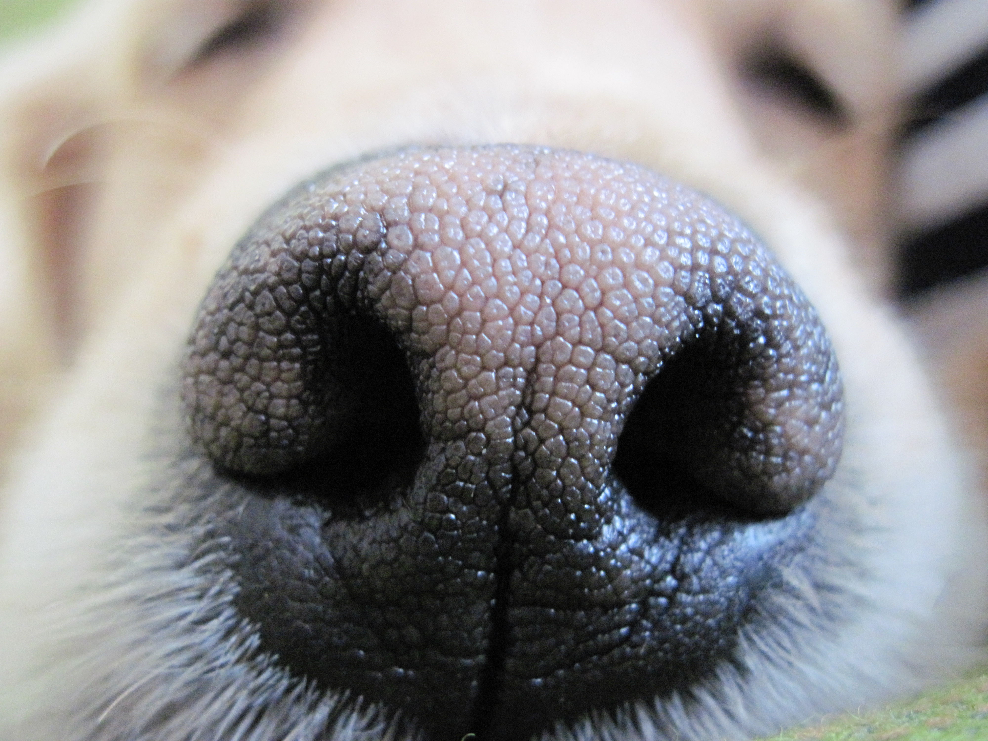 Mimi - Golden retriever